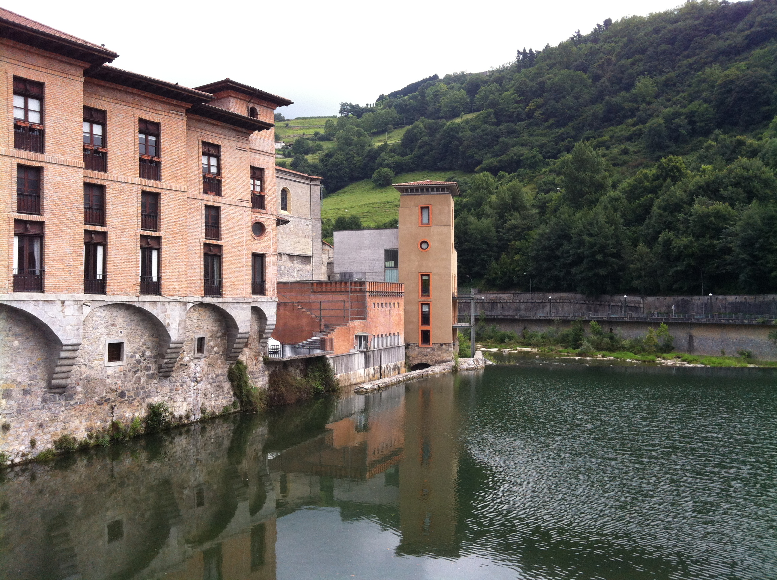 Biblioteca de Tolosa